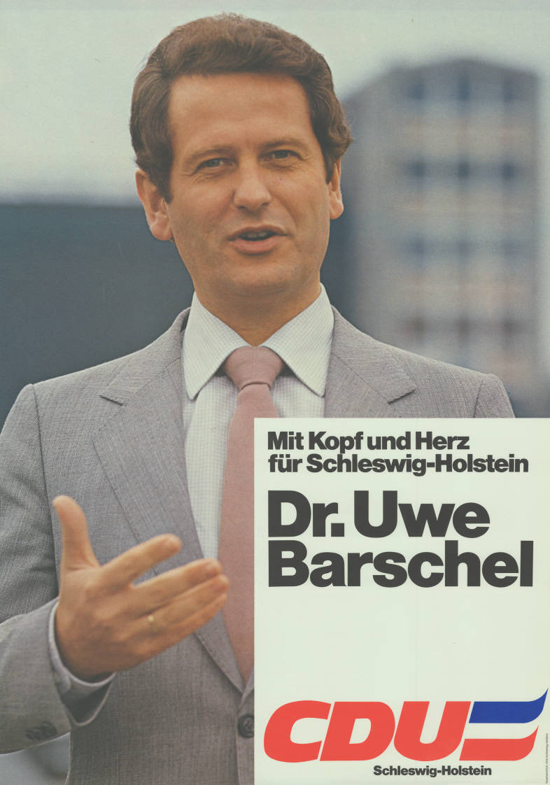 Mit Kopf und Herz für Schleswig-Holstein Dr. Uwe Barschel CDU Schleswig-HolsteinAbbildung:FotoPlakatart:Kandidaten-/Personenplakat mit PorträtAuftraggeber:Verantw.: CDU Schleswig-Holstein Objekt-Signatur:10-012 : 415Bestand:Landtagswahlplakate Schleswig-Holstein (10-012)GliederungBestand10-18:Landtagswahlplakate Schleswig-Holstein (10-012) » Landtagswahl am 29.4.1979 » KandidatenplakateLizenz:KAS/ACDP 10-012 : 415 CC-BY-SA 3.0 DE